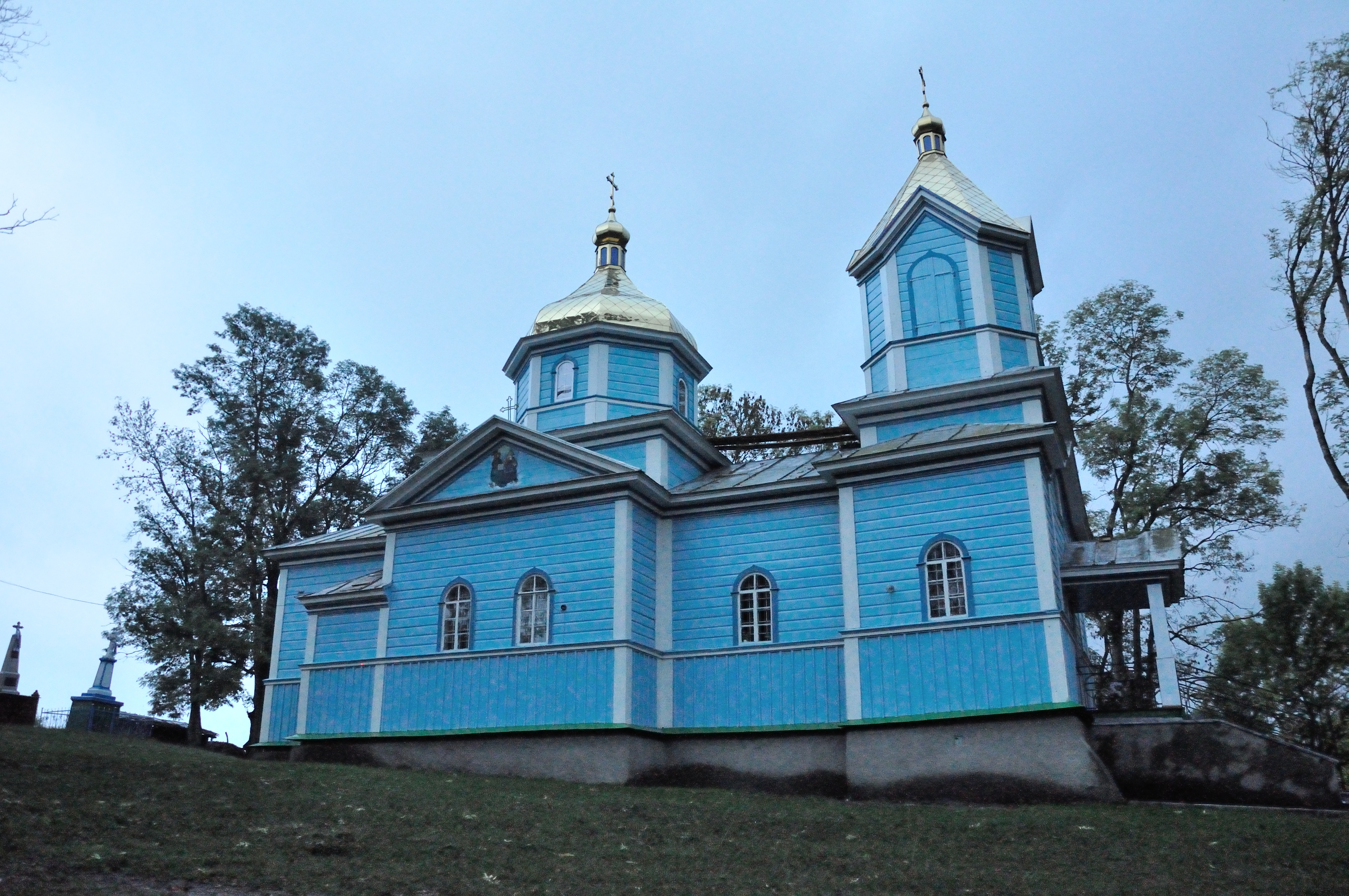 Троїцька церква (дер.), с.Білашів